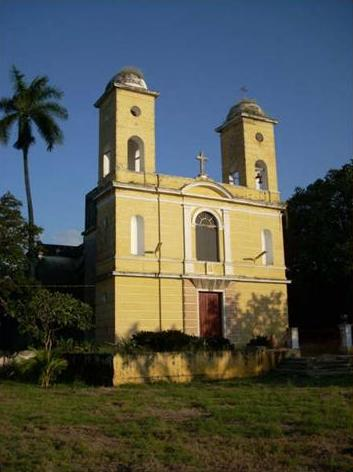 iglesia principal hacienda San José Chactún